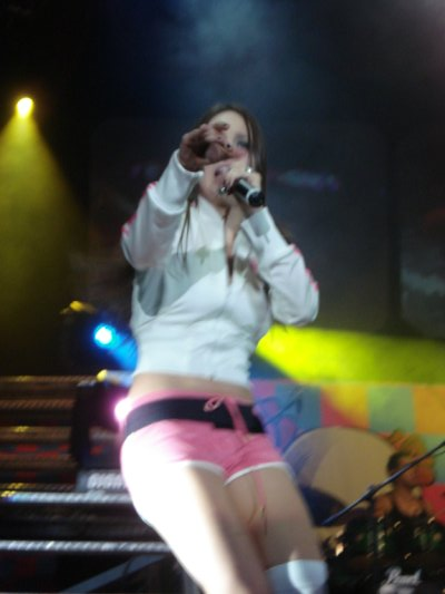 Belinda cantando Good...Good en el Auditorio Coca Cola en Monterrey Nuevo León, durante su gira Utopía